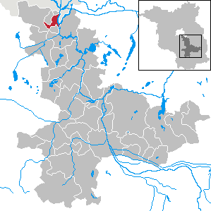 Zeuthen in Brandenburg (Country) - District Dahme-Spreewald